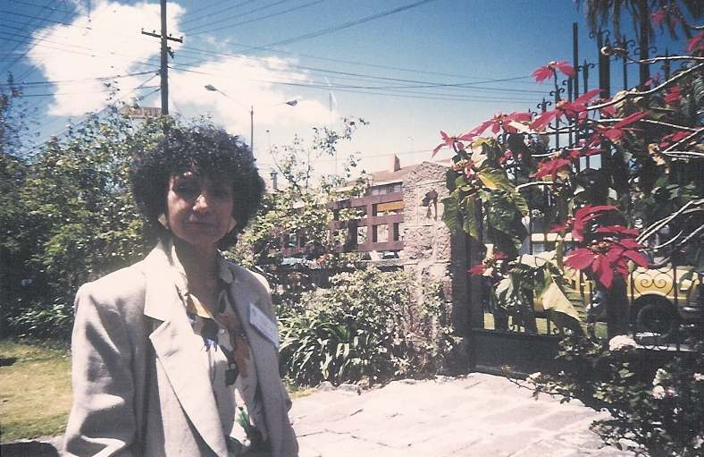 Argentine writer Luisa Valenzuela (born 1938), VIII Simposio Internacional de Literatura: Literatura del Mundo Hispánico, Universidad San Francisco de Quito (Ecuador)